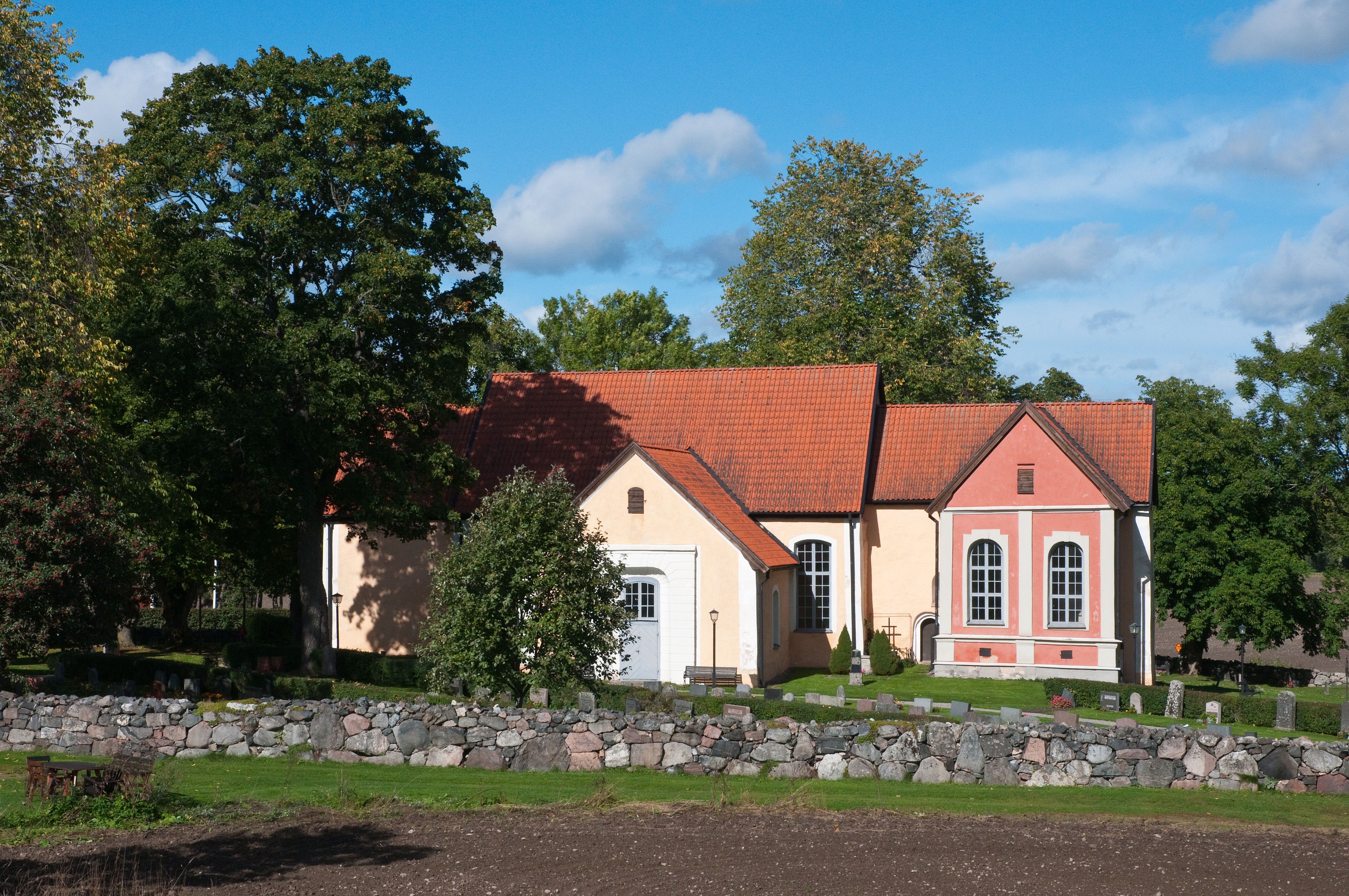 Runtuna kyrka i Nyköpings kommun